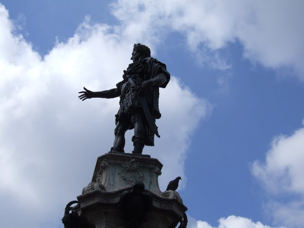 Augustusbrunnen in Augsburg